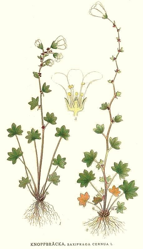 Original Description Knoppbräcka, Saxifraga cernua L.